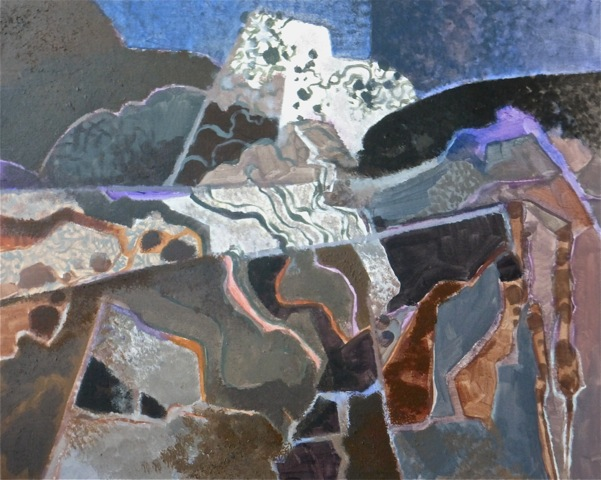 Près de Saint-Rémy-de-Provence, acrylique et sable sur toile